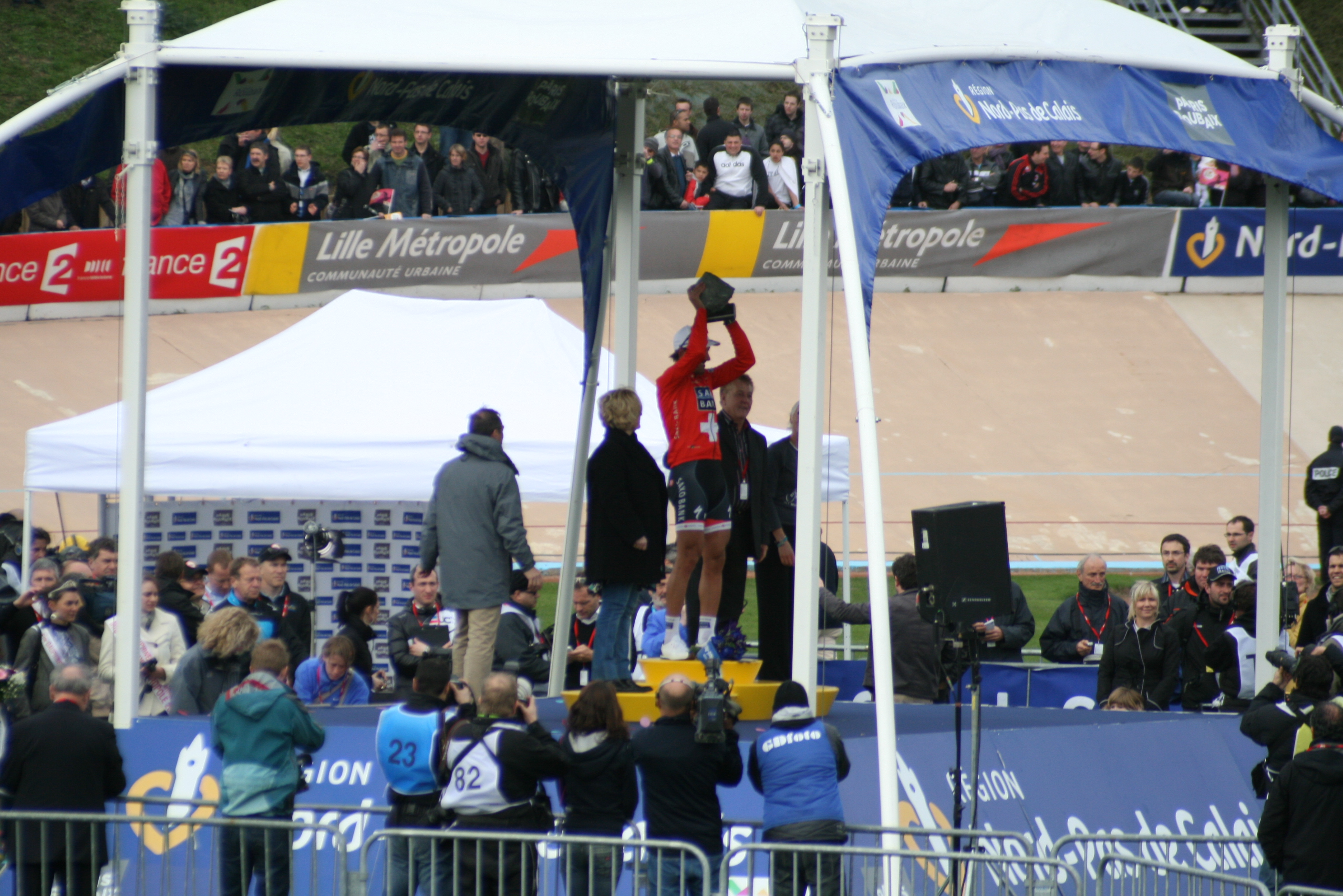 Fabian Cancellara sur le podium de Paris-Roubaix 2010